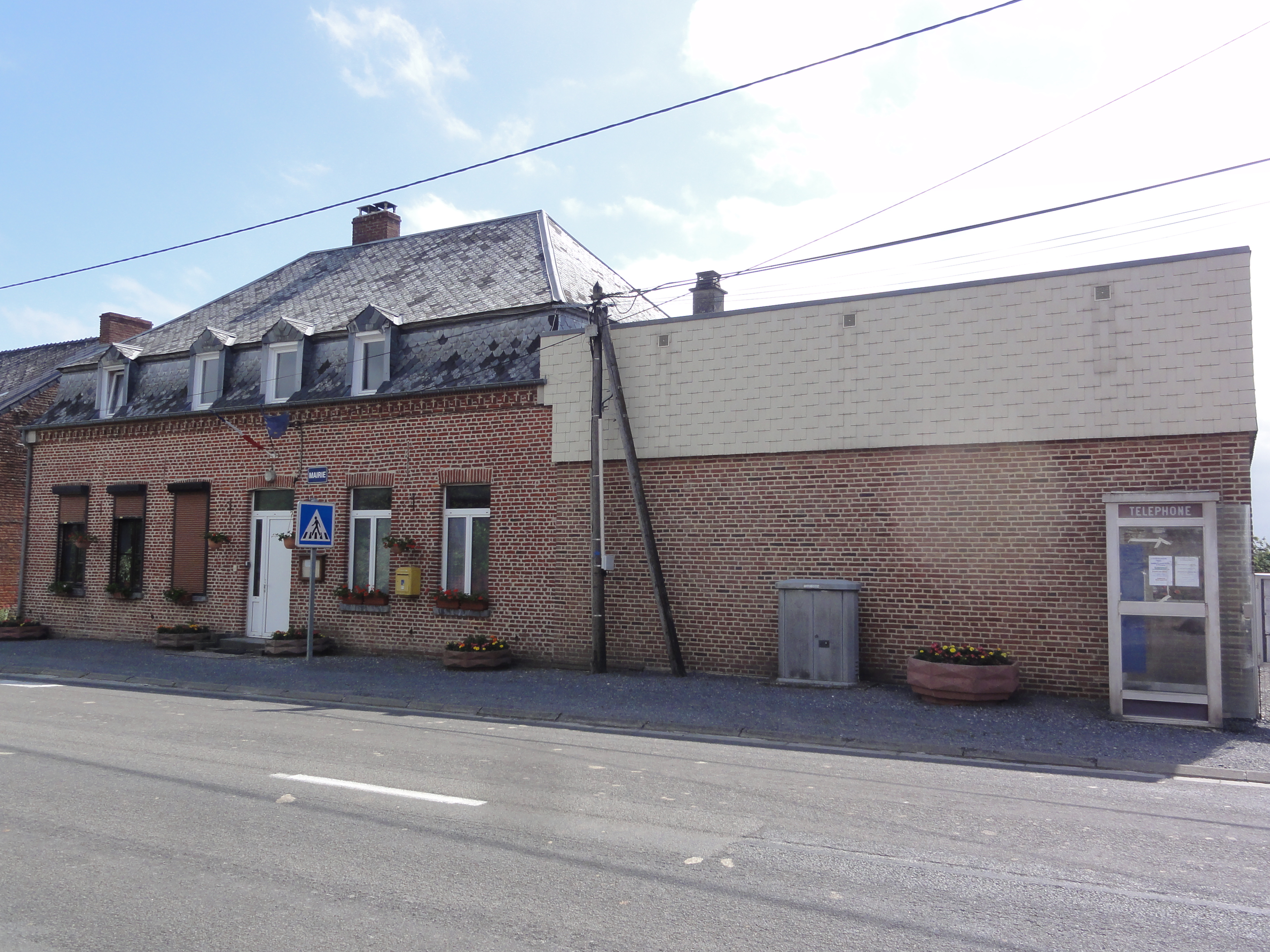 Froidestrées (Aisne) mairie